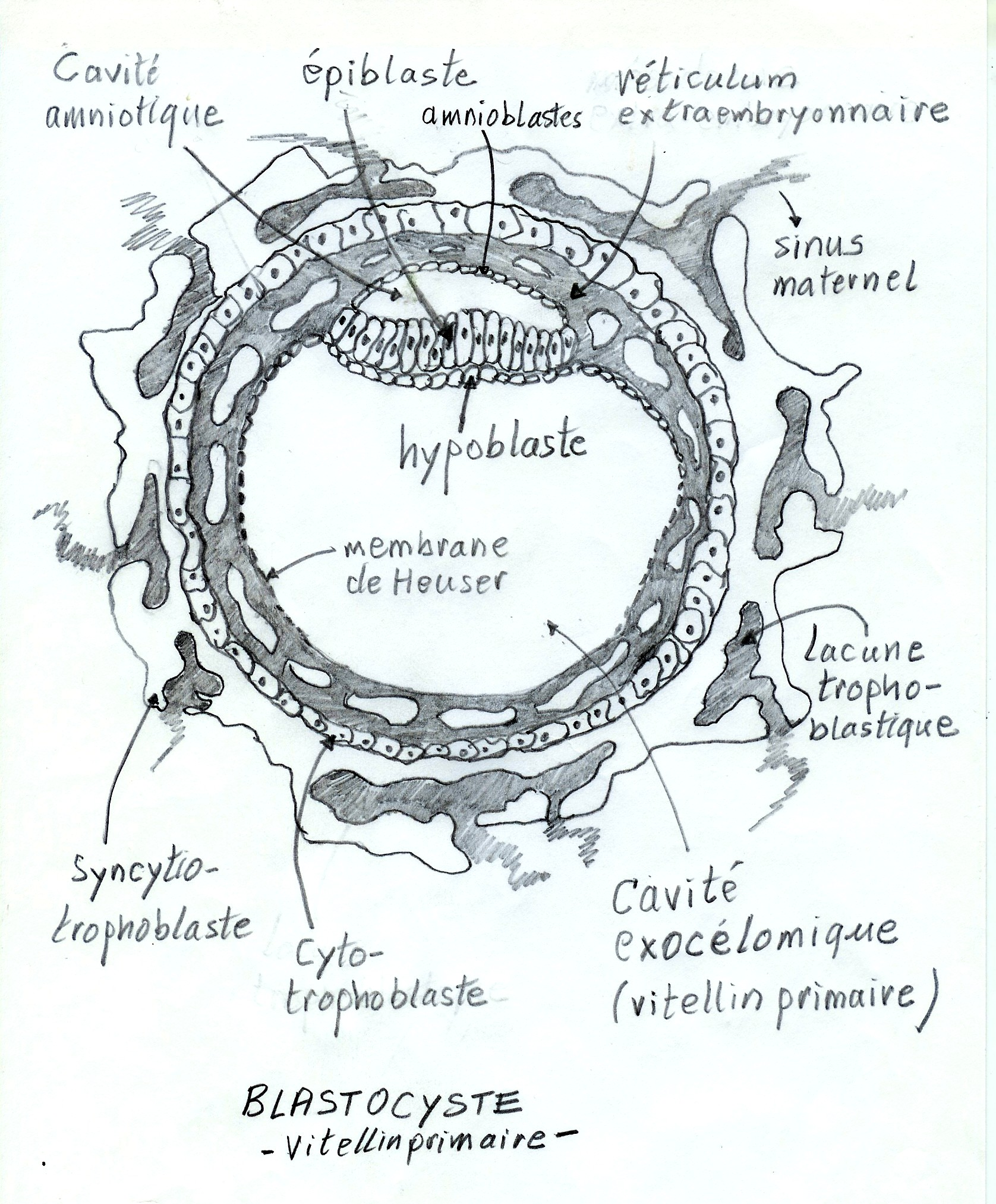 Description: Blastocyste et sac vitellin primaire. Coupe d'un blastocyste montrant la cavité amniotique, l'épiblaste, le réticulum extraembryonnaire, les sinus maternels, les lacunes trophoblastique, la cavité exocélomique, le syncitiotrophoblaste, le cytophotoblaste. Source: Dessin original. Auteur: Michel Hamels. Cette image est: librement diffusable à titre commercial ou non librement modifiable et l'image modifiée est elle-même librement modifiable et diffusable à titre commercial ou non. Michel Hamels 28 mars 2006 à 21:16 (CEST)